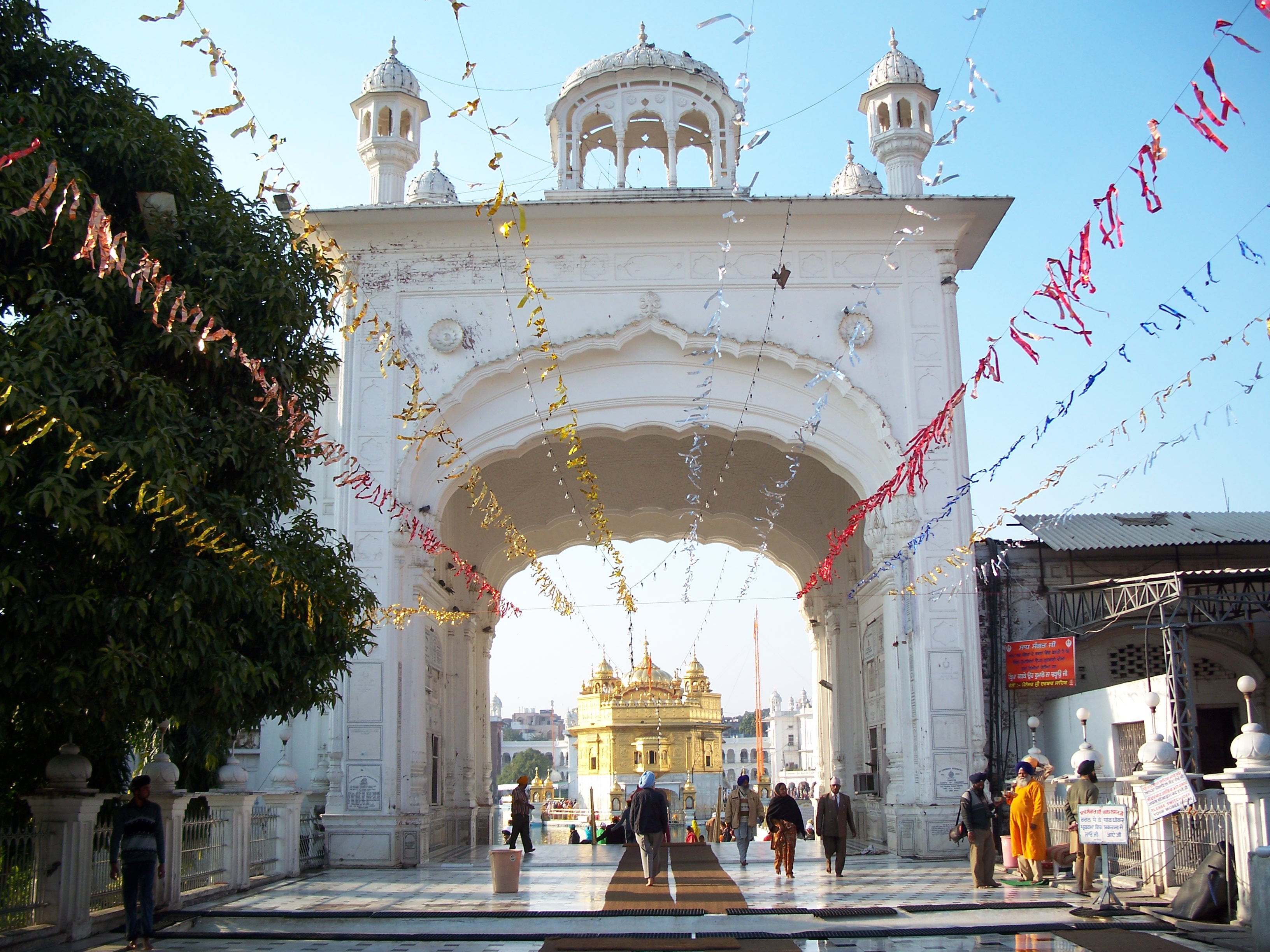 Golden Temple